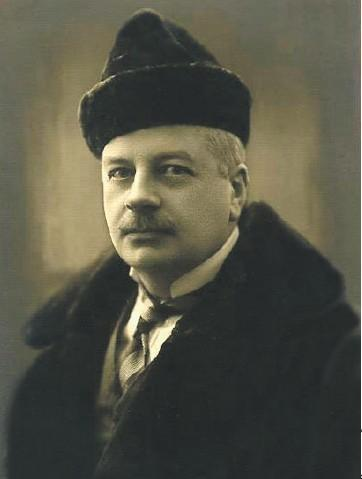 Александр Игнатьевич Владовский